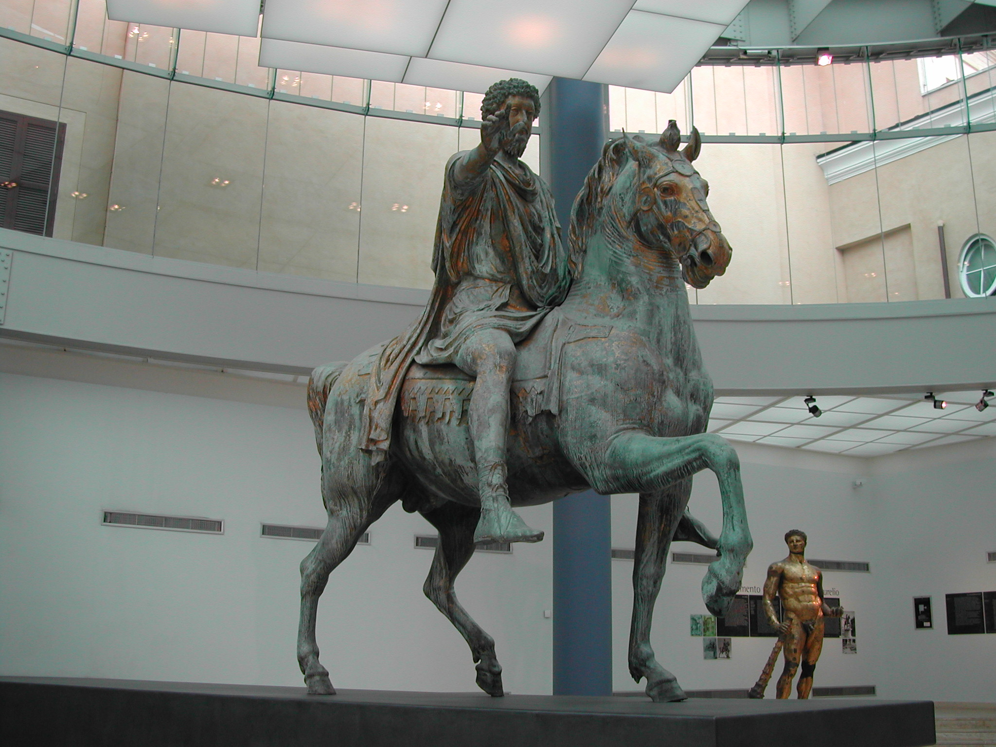 Estatua ecuestre de Marco Aurelio. Museo Capitolino, Roma.